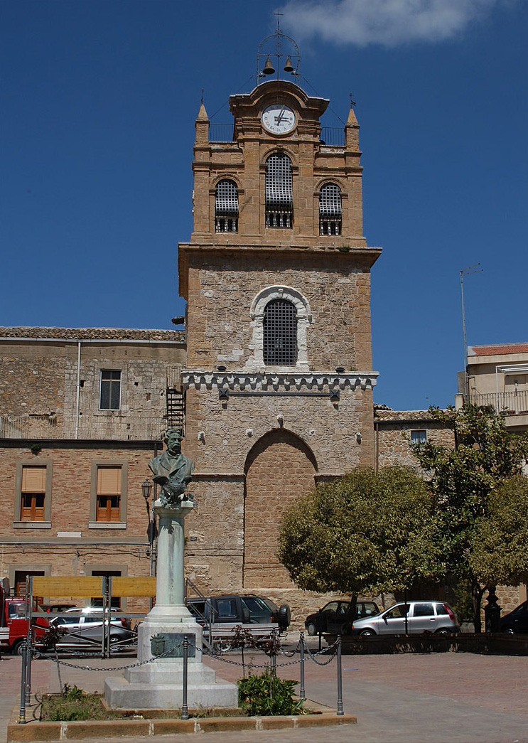 Aidone En_Sicilia: Torre Adelasia, sono riconoscibili tre stili risalenti ad epoca diversa:normanna,catalana, neoclassica